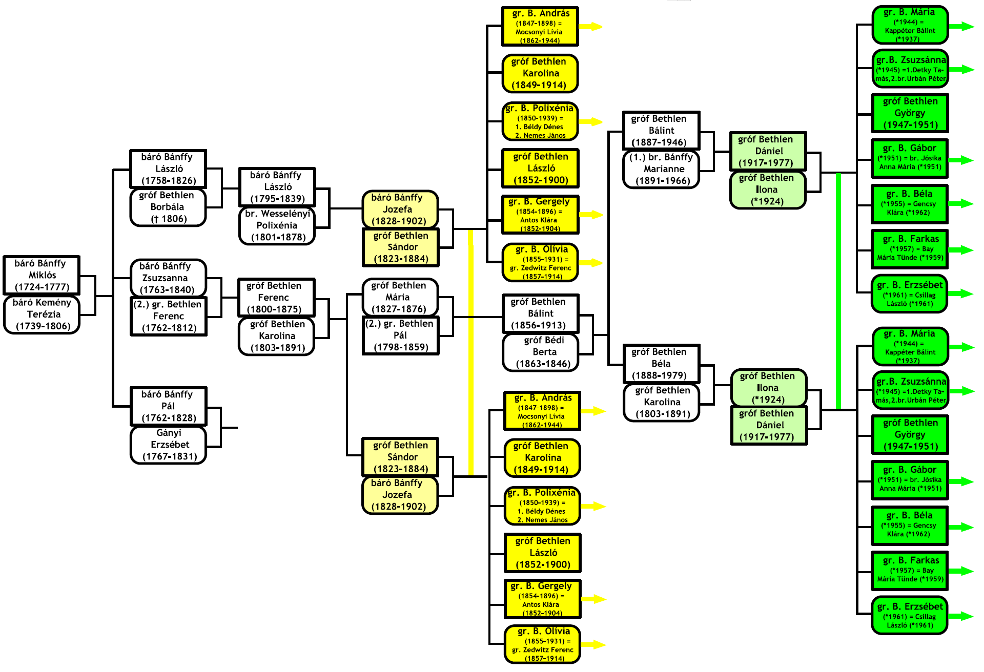 Utódvesztés